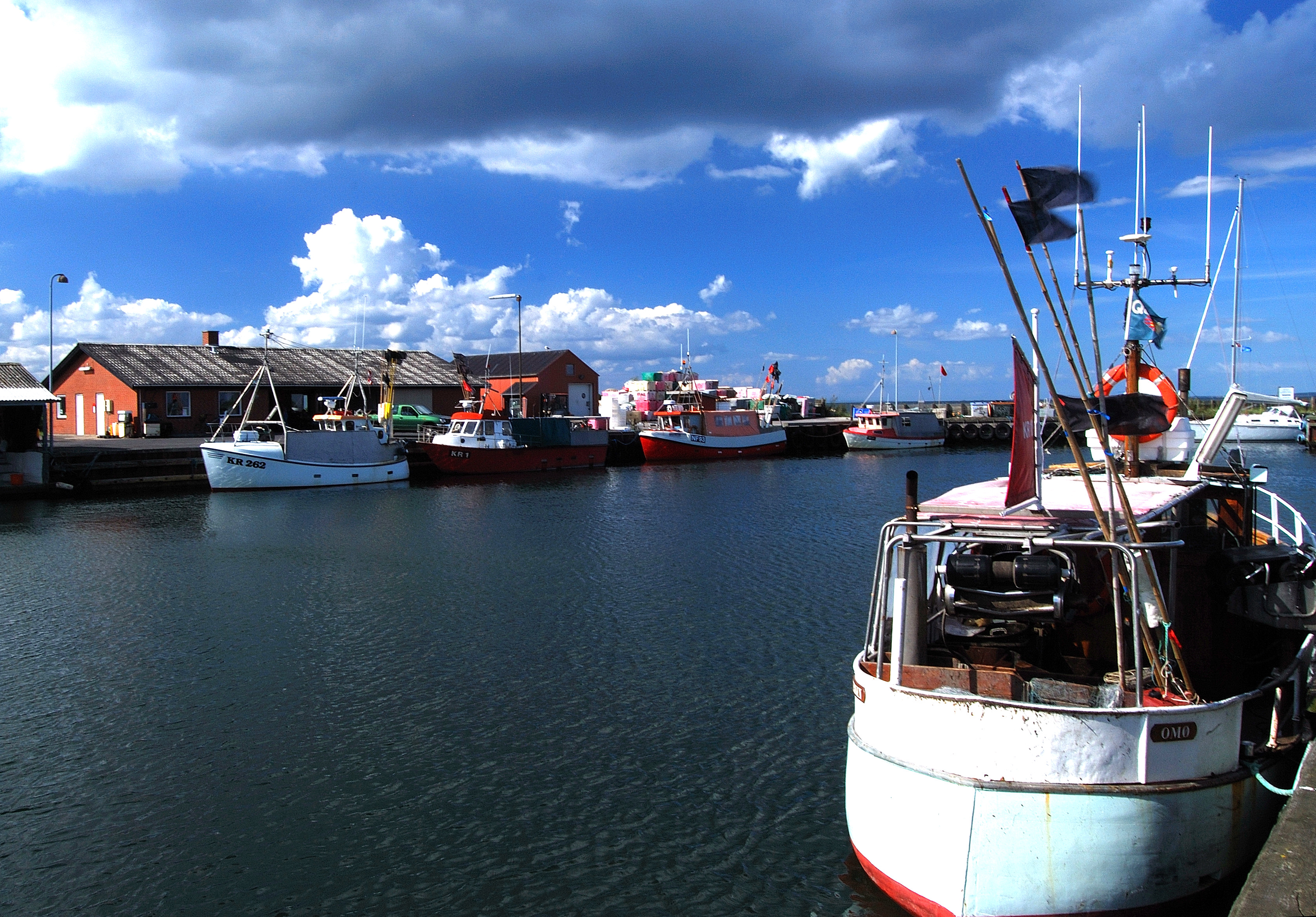 Omø Havn